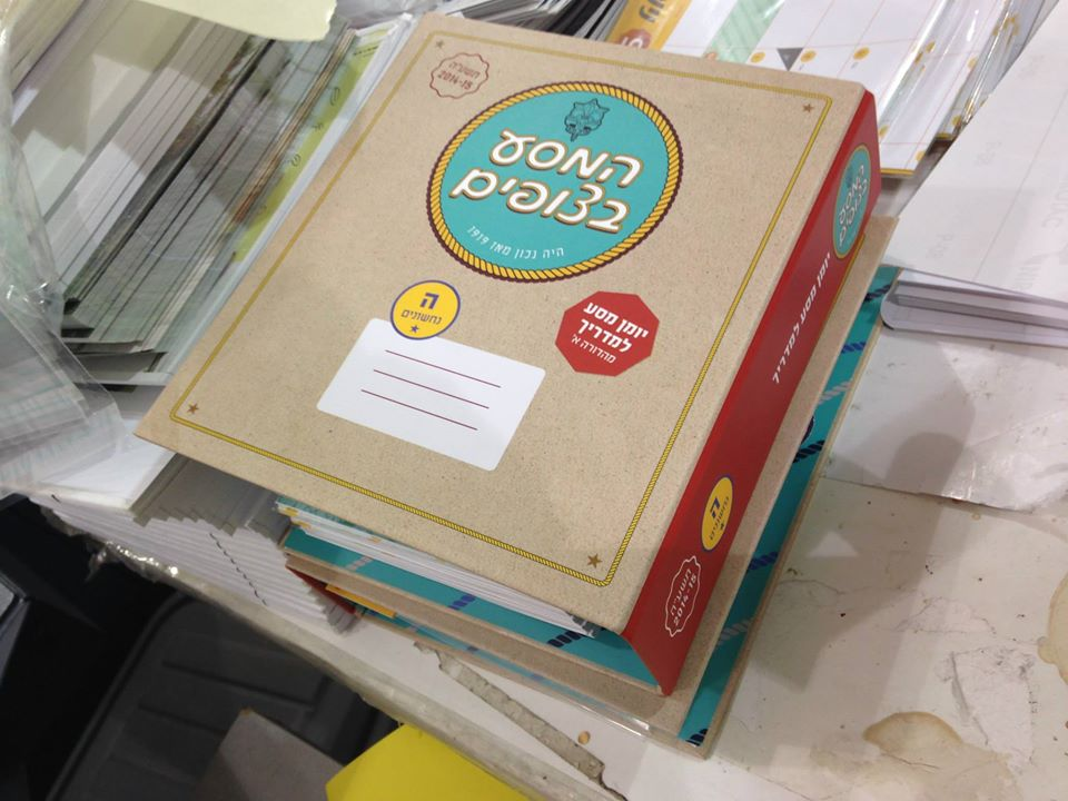 תוכנית ההדרכה של תנועת הצופים העבריים בישראל